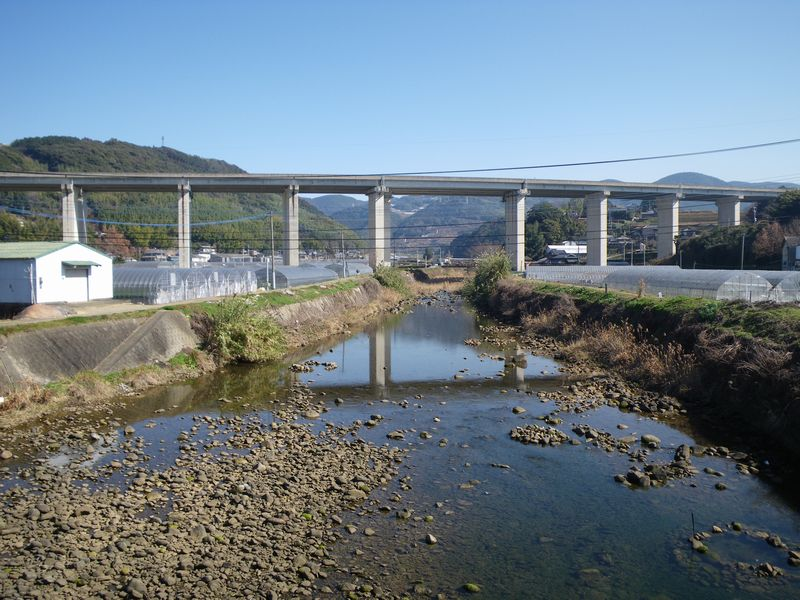 千綿川下流。谷を渡る大きな橋は長崎自動車道・千綿川橋。